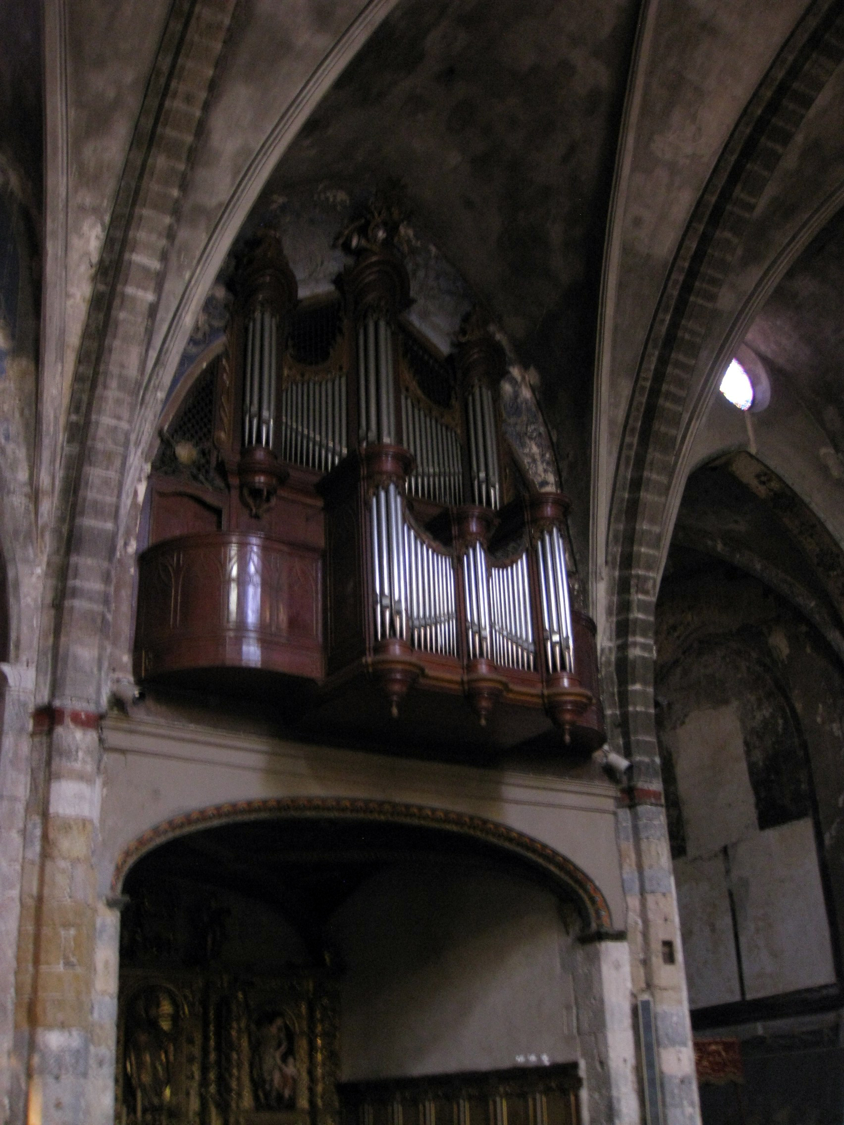 Església de Sant Jaume (Perpinyà), l'orgue